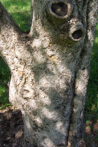 Auranticarpa rhombifolia trunk